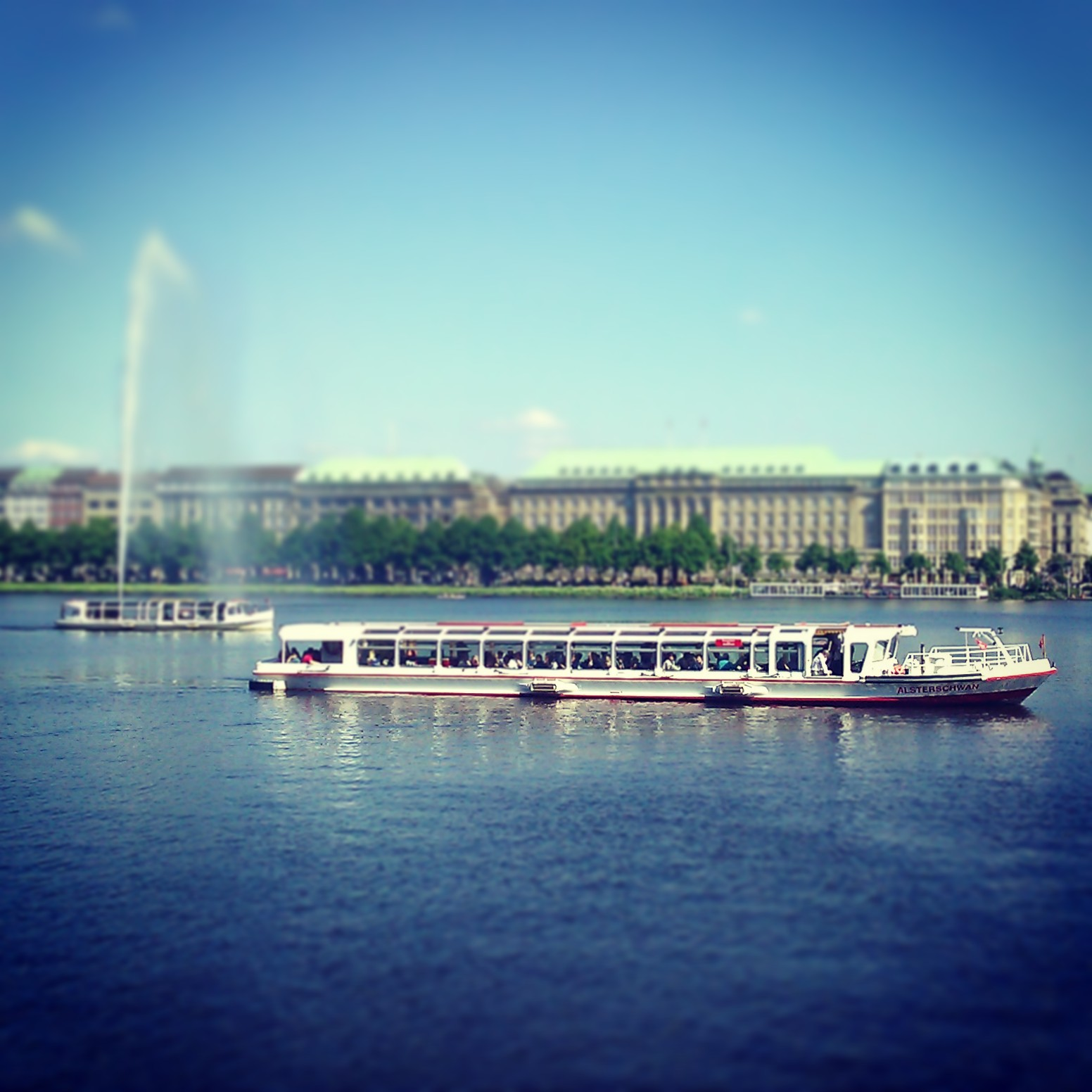 Der Hamburger Jungfernstieg, bearbeitet mit einem typischen Filter der App Instagram.